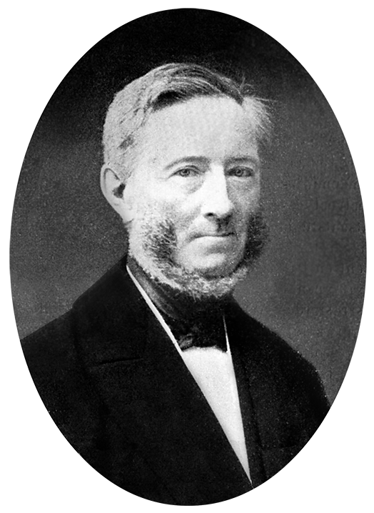 Bewerking van